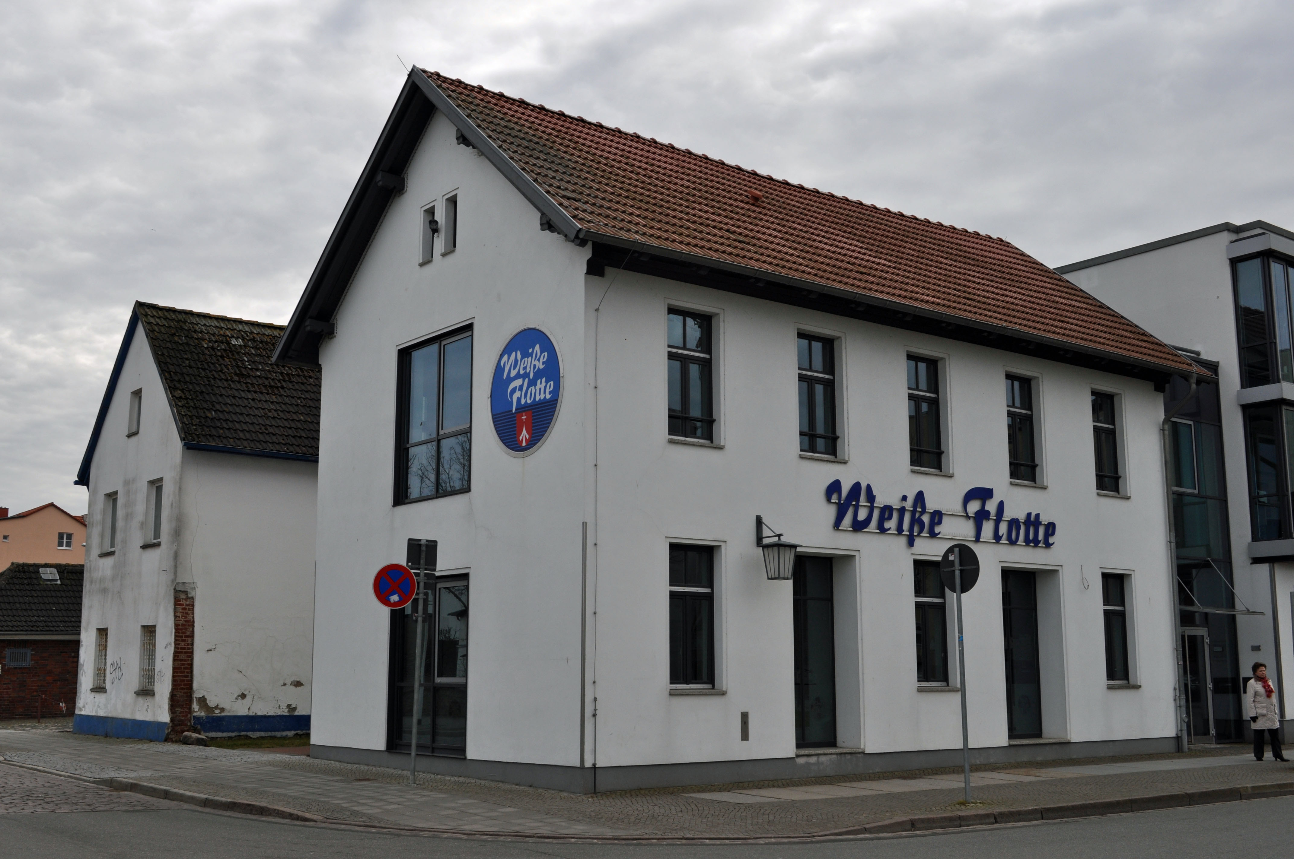 Gebäude bzw. Gebäudedetail in Stralsund. Straße und Hausnummer siehe Dateiname.